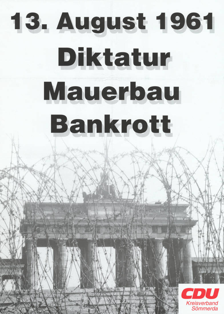 13. August 1961 Diktatur Mauerbau Bankrott CDU Kreisverband Sömmerda Abbildung: Mauer und Stacheldraht vor Brandenburger Tor Plakatart: Motiv-/Textplakat Auftraggeber: KV Sömmerda Objekt-Signatur: 10-031 : 777 Bestand: CDU-Plakate (10-031) GliederungBestand10-18: Motivplakate Lizenz: KAS/ACDP 10-031 : 777 CC-BY-SA 3.0 DE